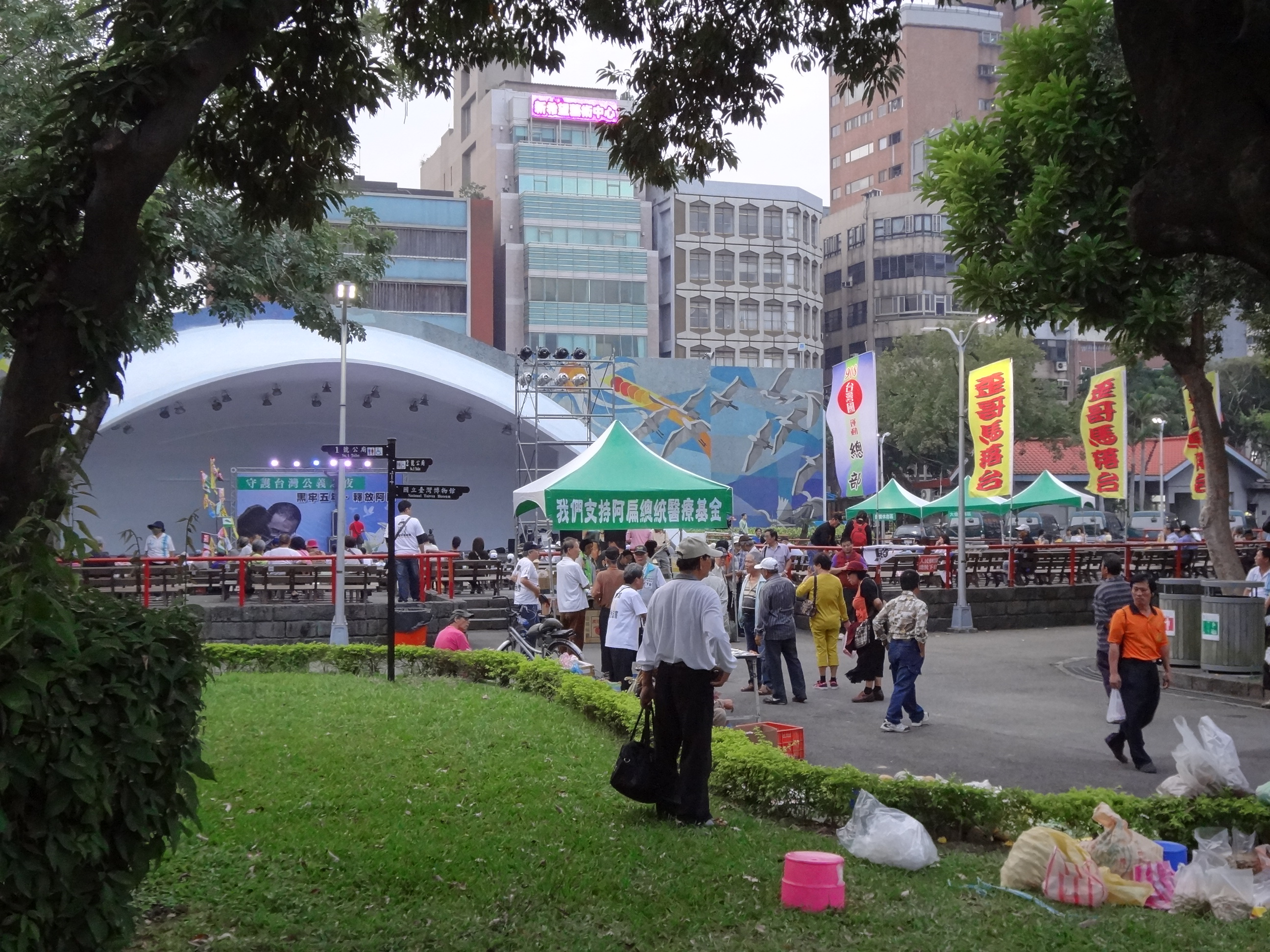 一邊一國連線、凱達格蘭基金會與陳水扁辦公室於台北市二二八和平紀念公園露天音樂台共同主辦「守護台灣公義之夜：黑牢五年·釋放阿扁」晚會，908台灣國運動加入。